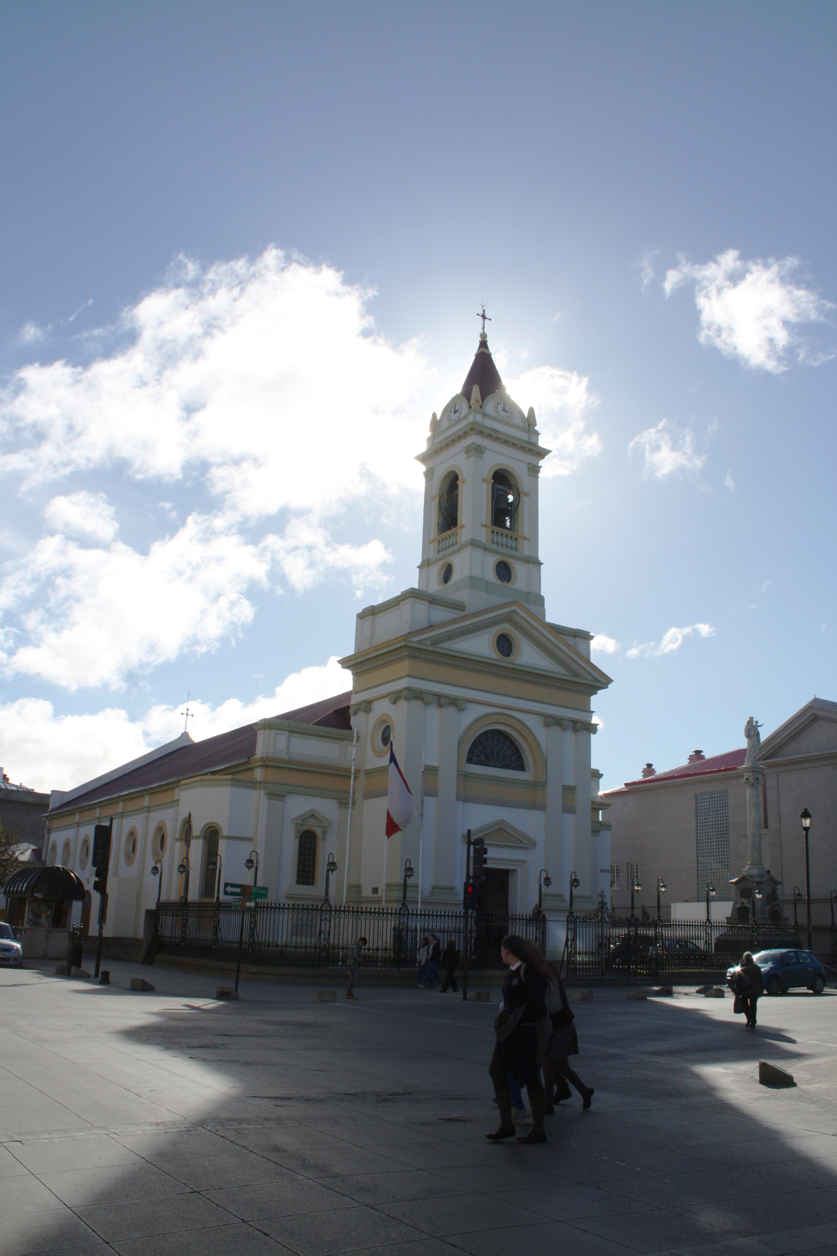 Catedral de Punta Arenas